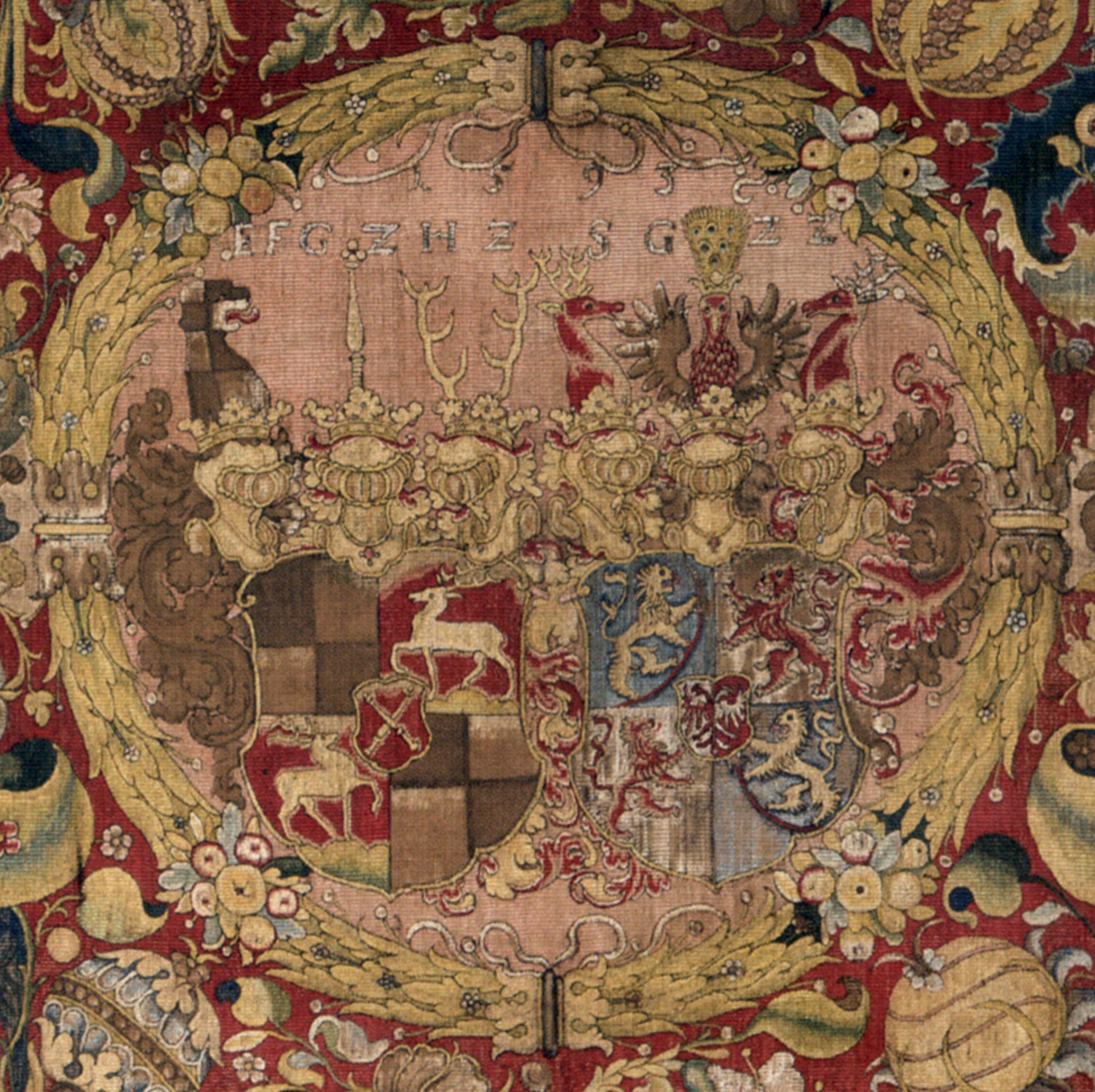 Wappenteppich mit Allianzwappen Zollern-Zimmern für Graf Eitelfriedrich I. von Hohenzollern-Hechingen und Sybilla von Zimmern, 244 x 210 cm, um 1575, Fürstlich Hohenzollerische Sammlungen Sigmaringen